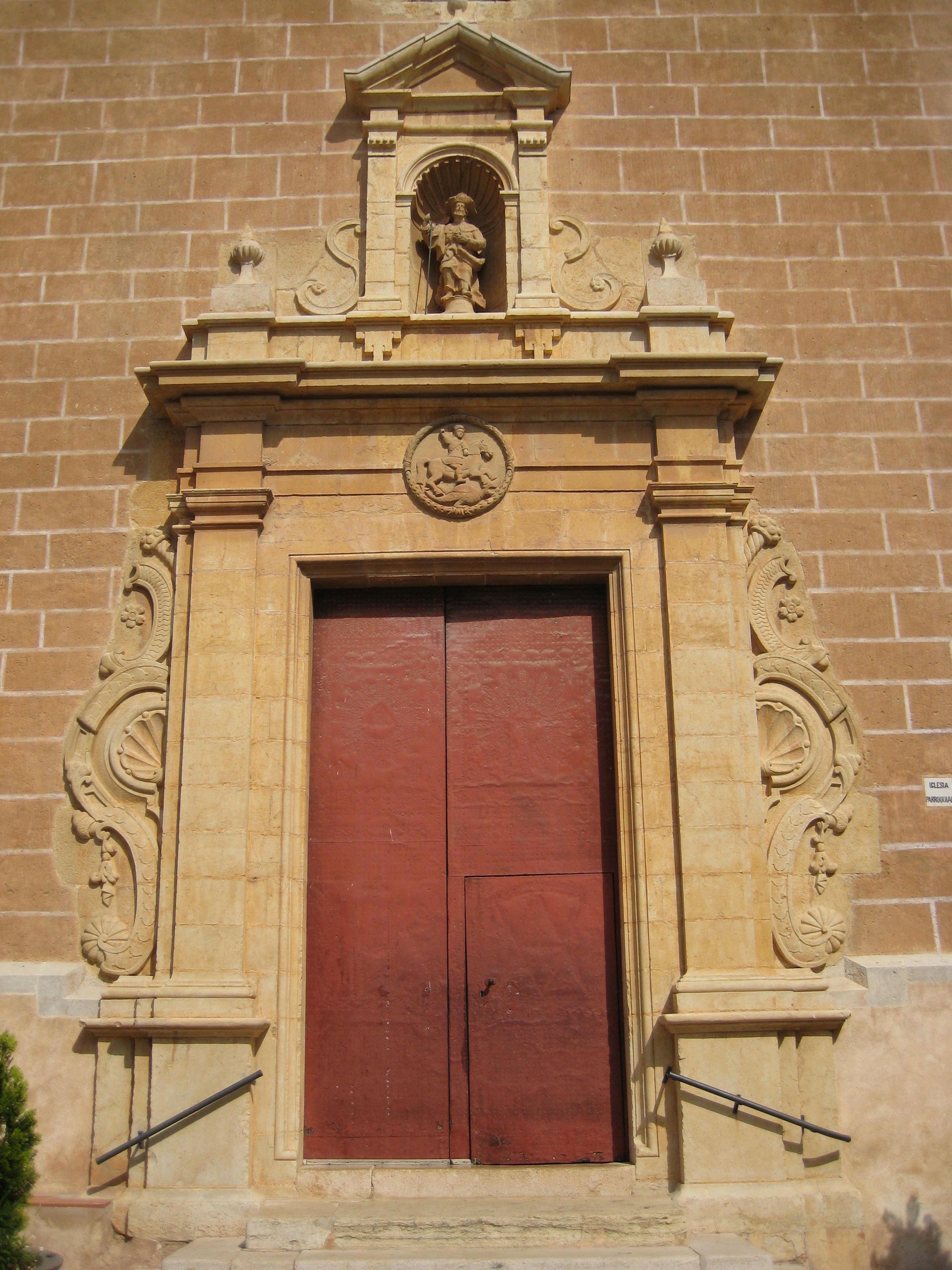 Portada de l'església de Sant Jaume en Sant Jordi del Maestrat (Baix Maestrat)